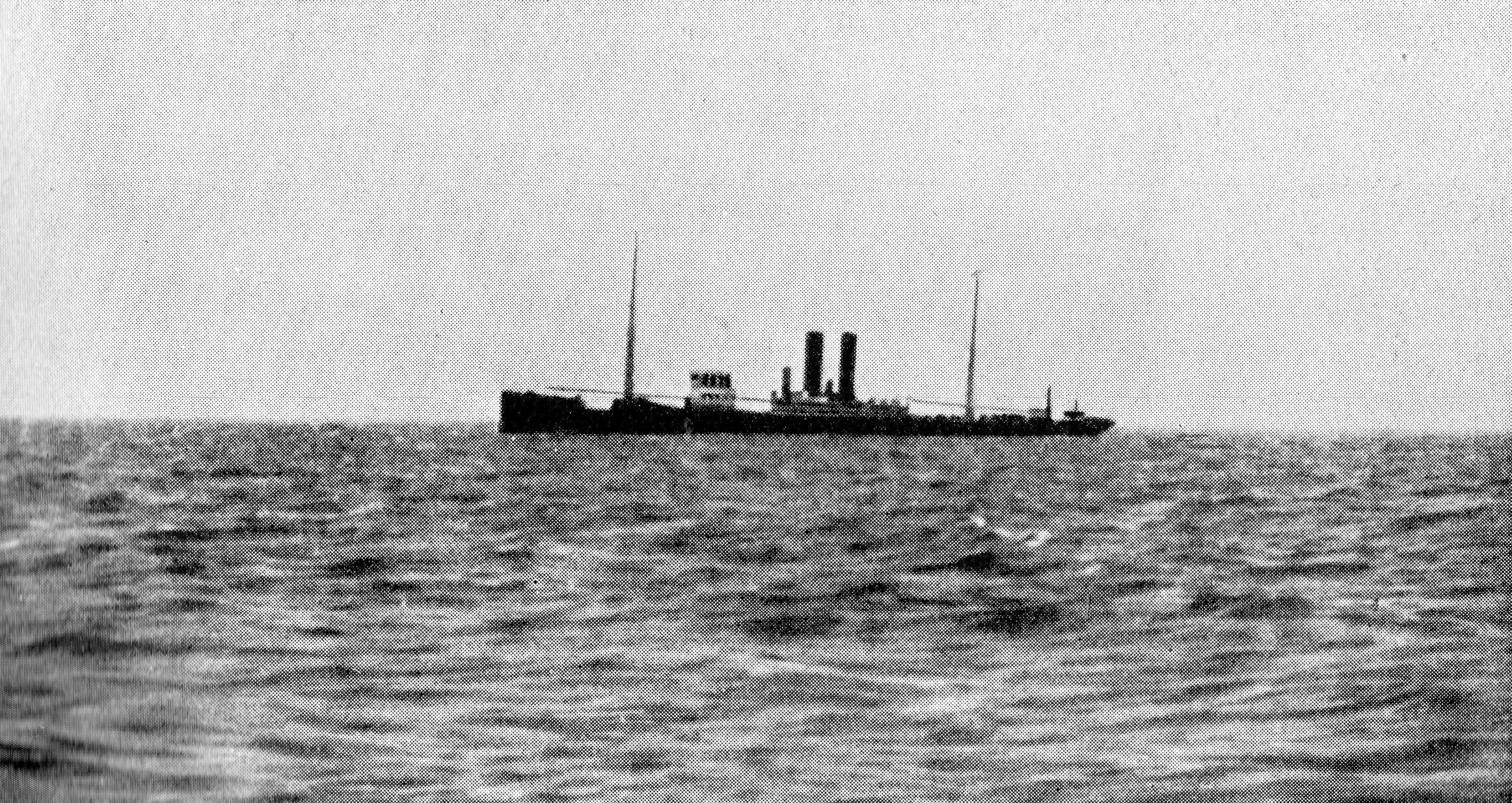 Hilfskreuzer SMS GREIF ex deutsches Handelsschiff GUBEN. Aufnahmeort und -zeit unbekannt.